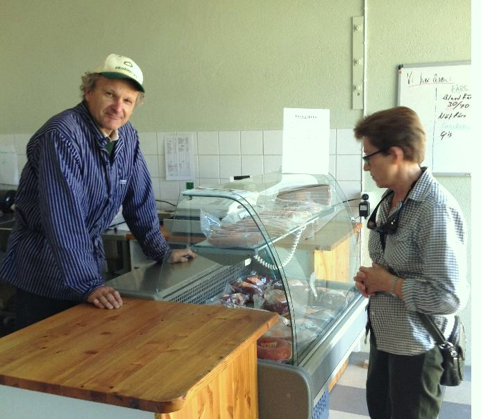 Gårdsförsäljning på Husa gård, Brottby, Vallentuna kommun. Bakom köttdisken står gårdshandlaren och lantbrukaren Staffan Ahrén.